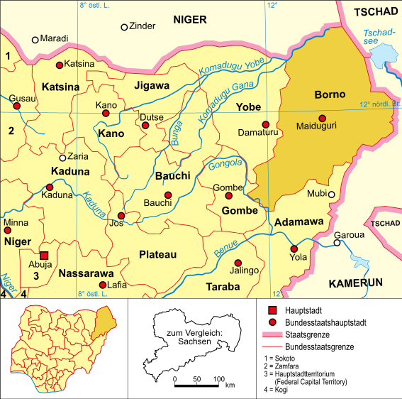 Politische Karte Nigerias (Bundesstaat Borno hervorgehoben)